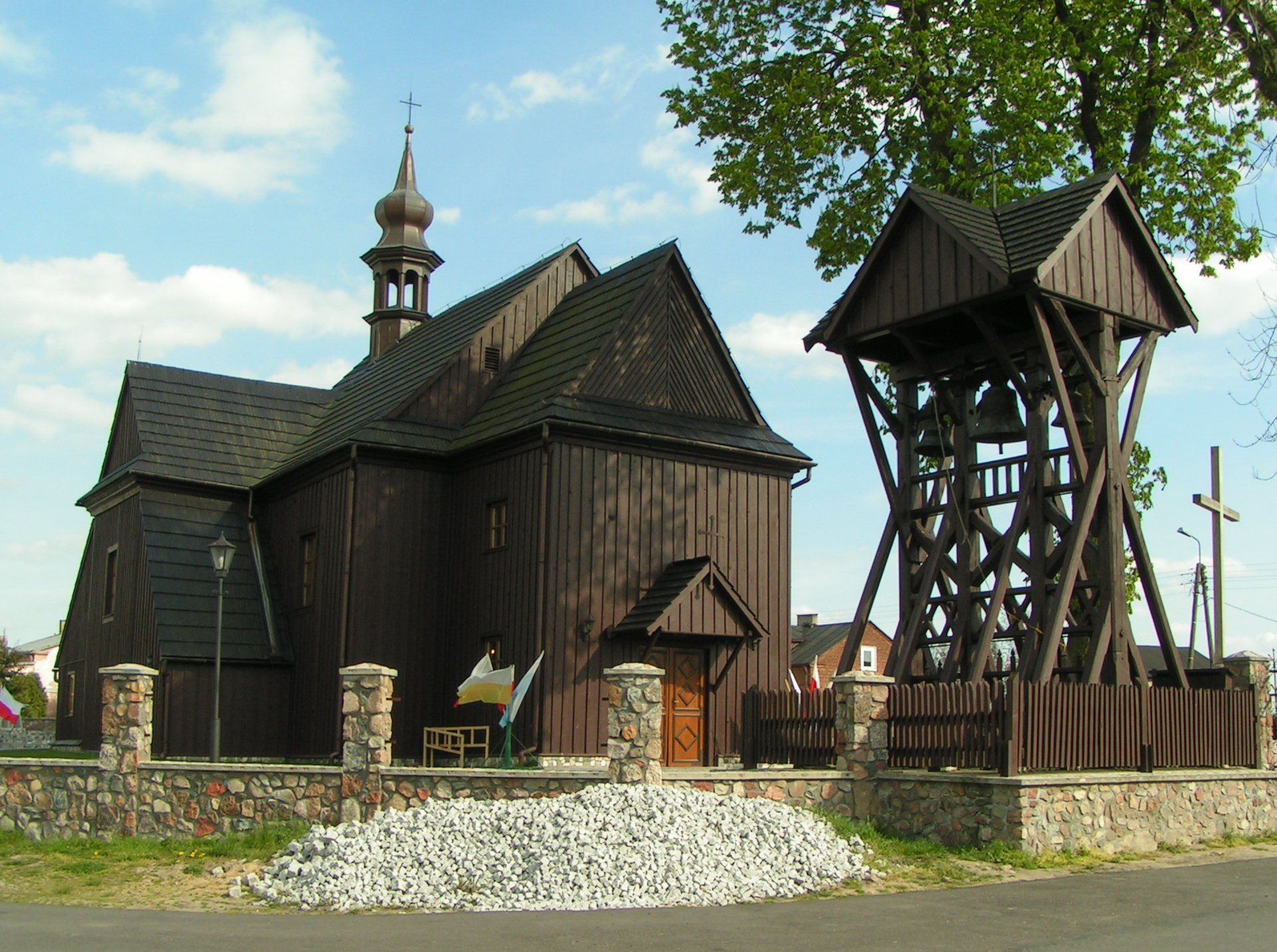 Drewniany kościół w Dębach Szlacheckich.